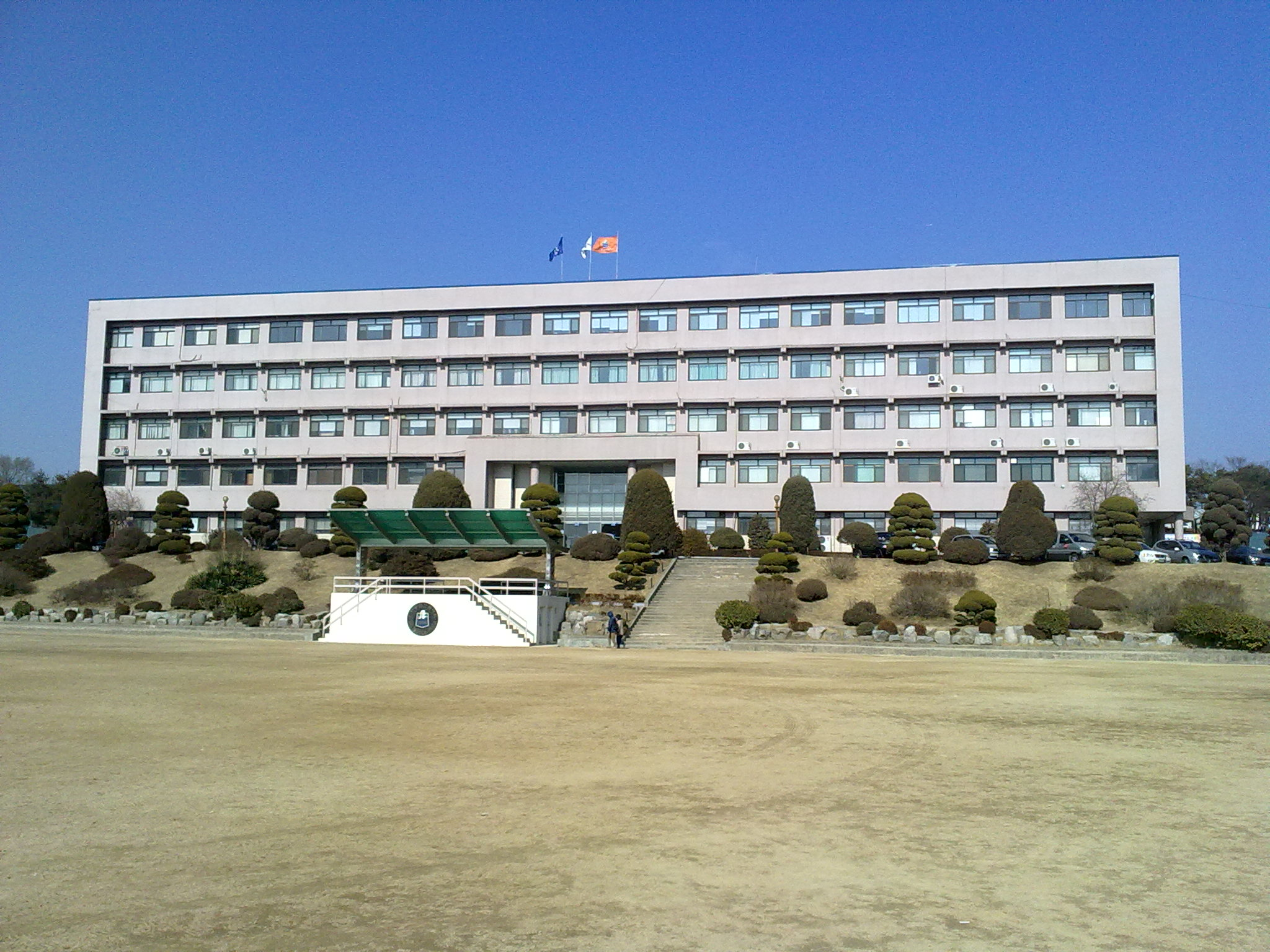 인하공업전문대학 본관